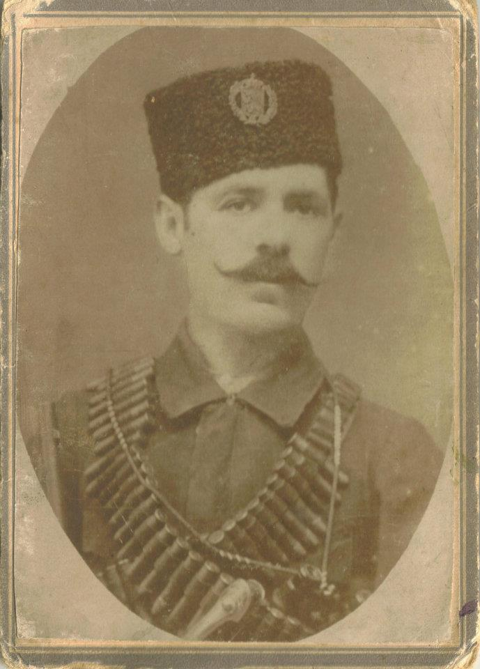 Фоти Кирчев.